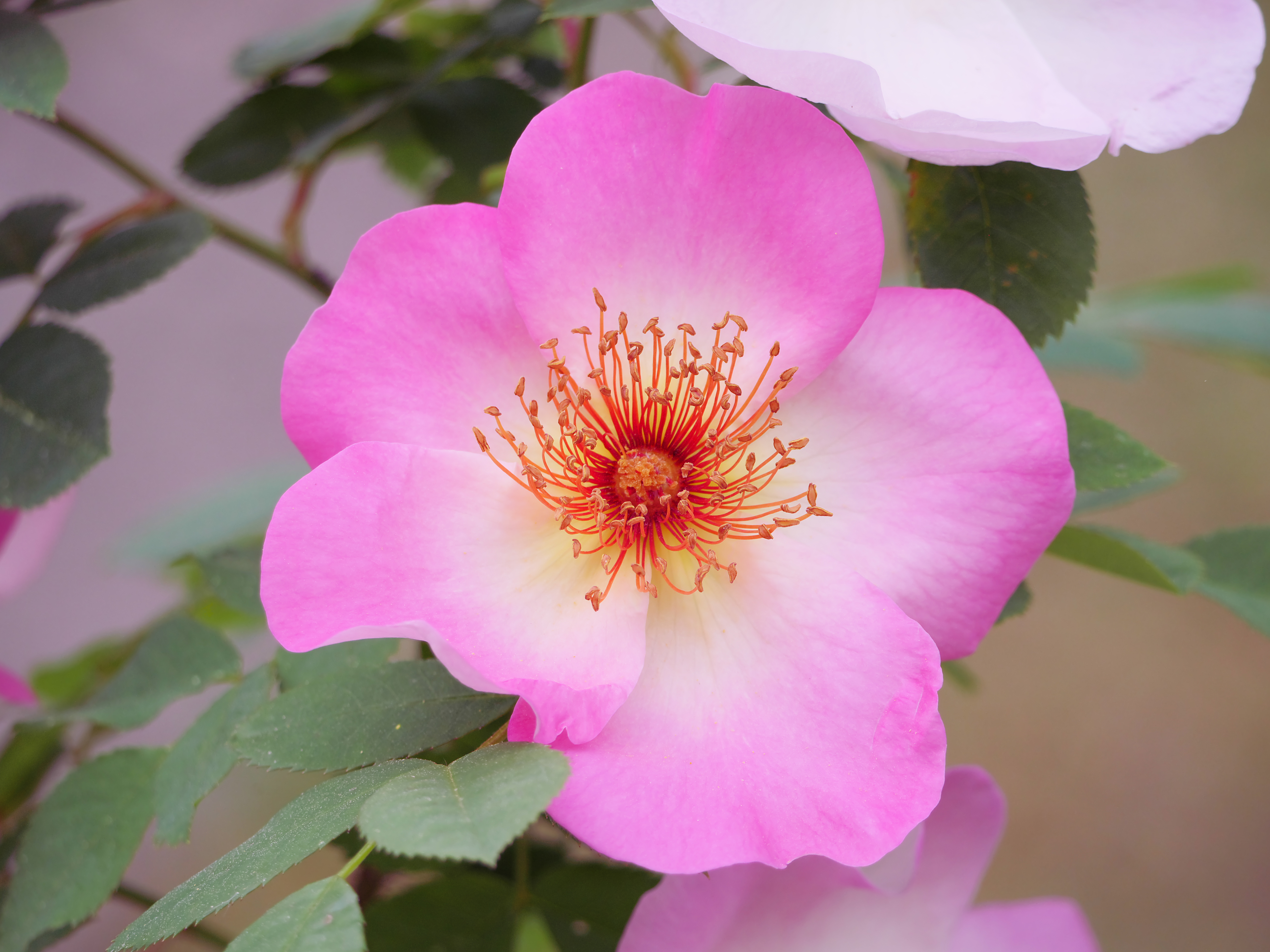 Blüte der Hunds-Rose